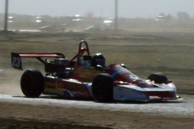 Carrera de F-2 en Chañar Ladeado. Emanuel Girón.